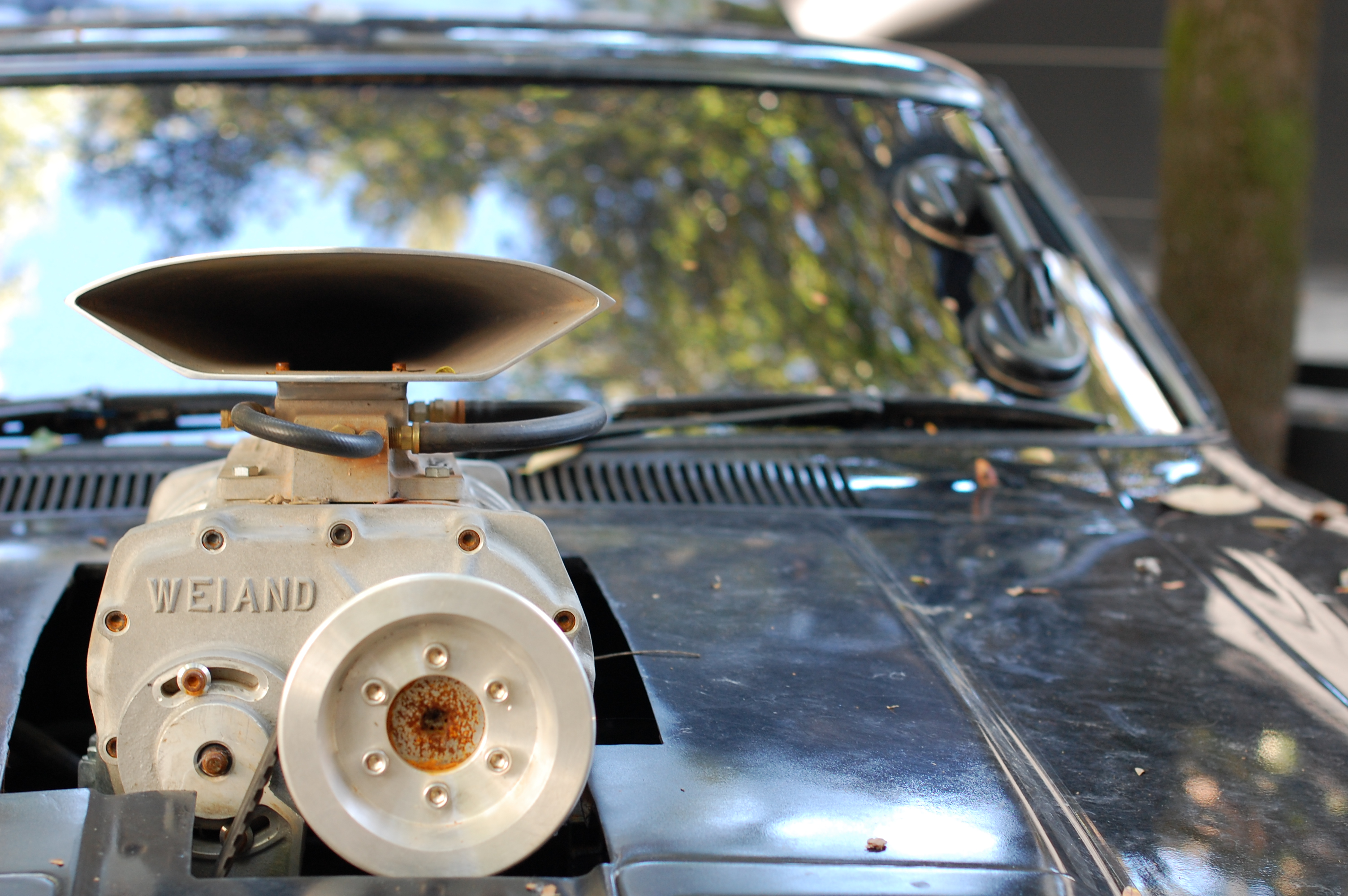 Biennale di Venezia, Padiglione Australia